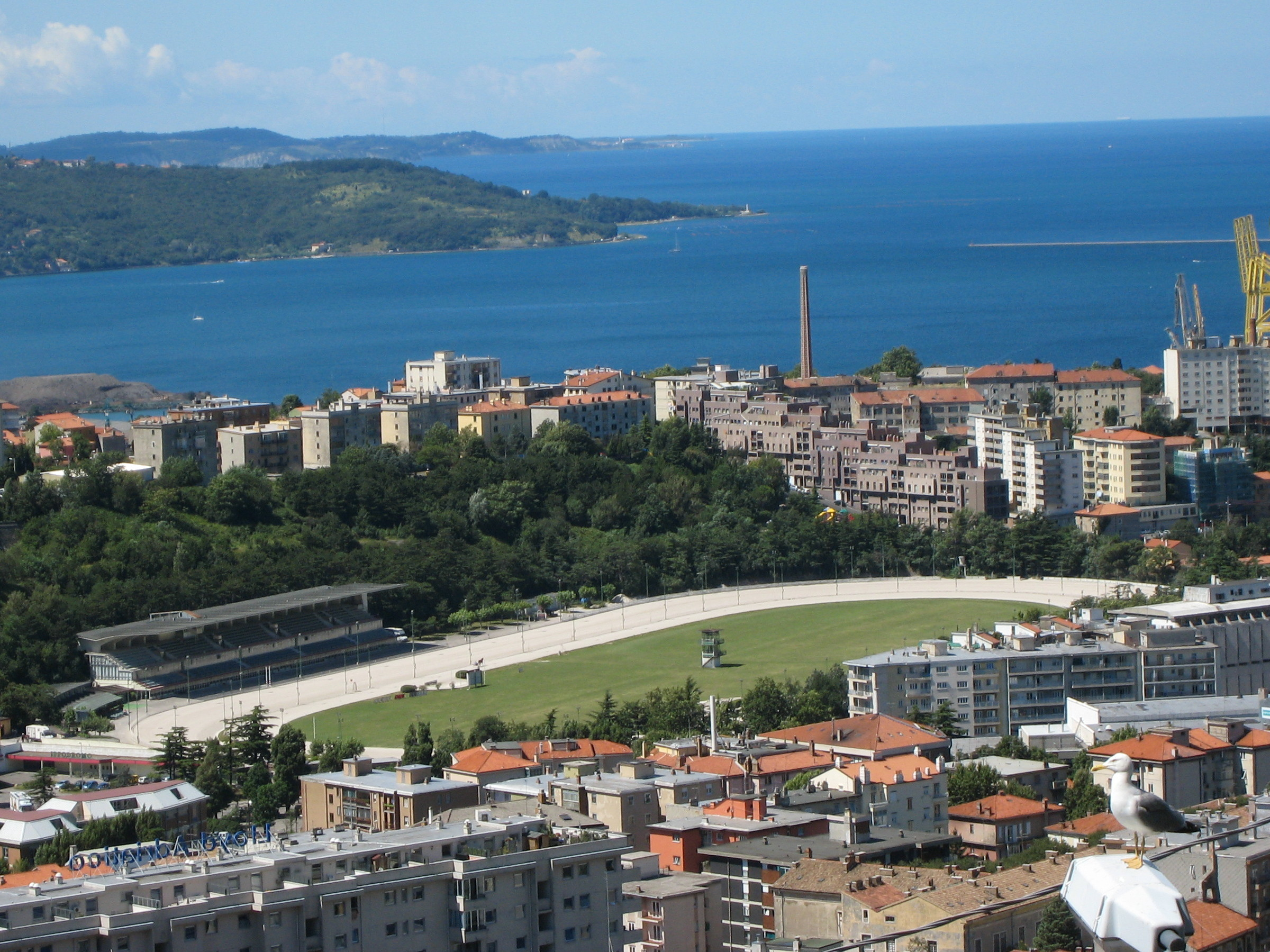 Italy - Trieste - Ippodromo di Montebello